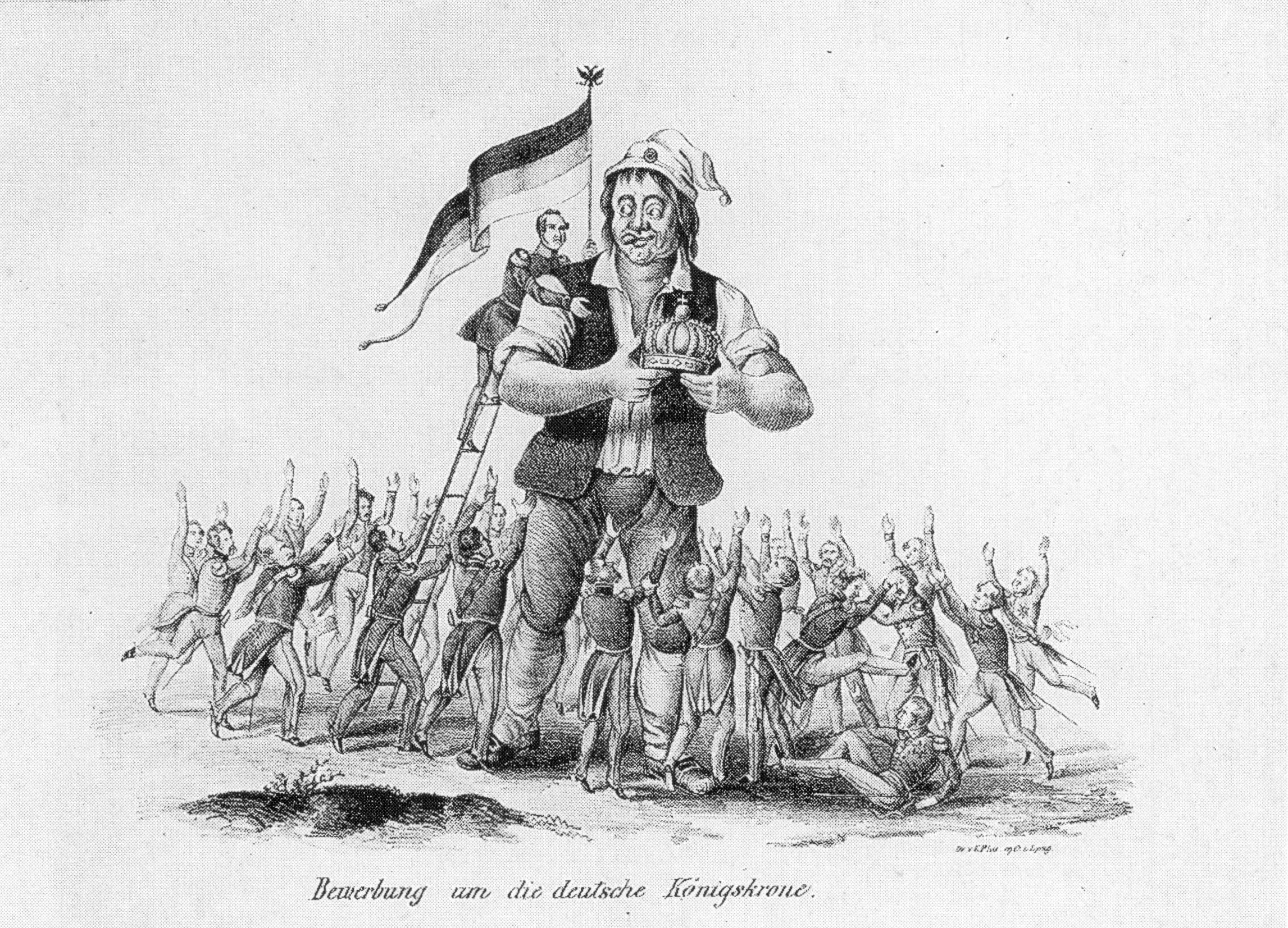 Lithographie, 1848. “Bewerbung um die deutsche Königskrone”.